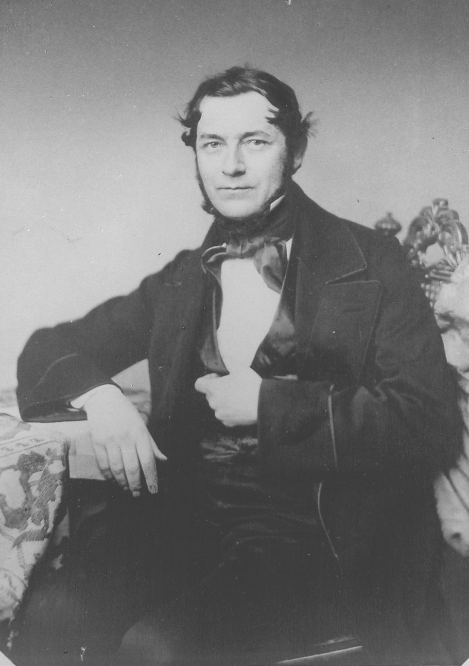 Robert Bunsen (* 30. März 1811 in Göttingen; † 16. August 1899 in Heidelberg), Habilitation